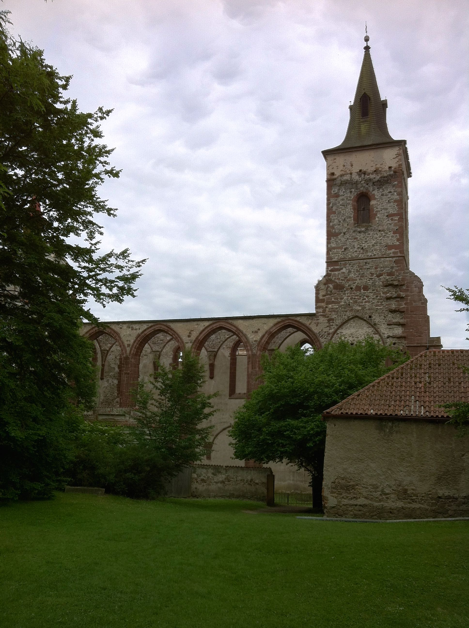 Sázavský klášter benediktinů - věž a klenba gotického chrámu ze severní zahrady